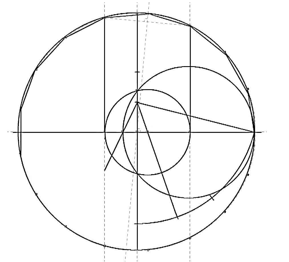 Construcció d'un heptadecagon amb regla i compas.